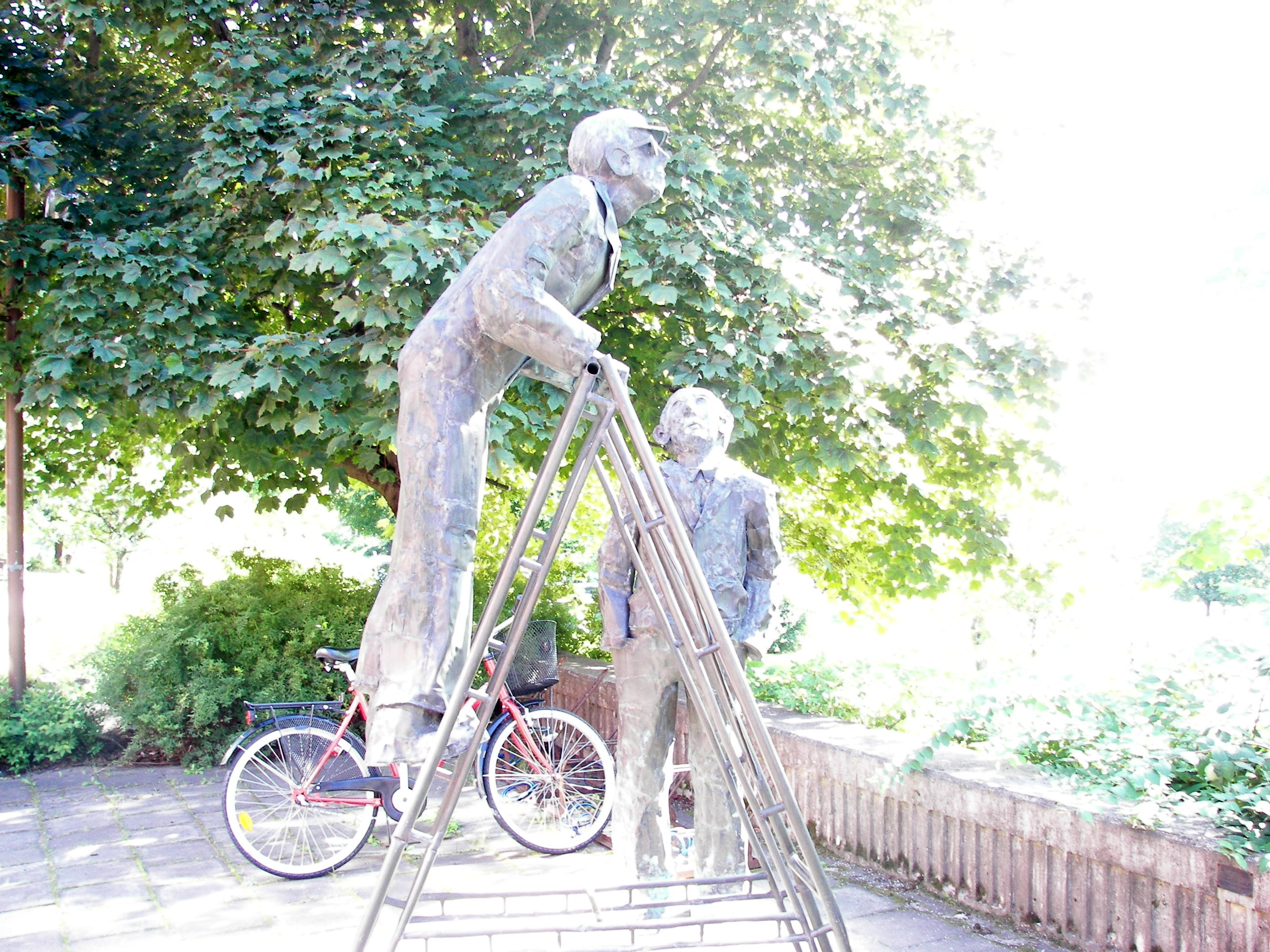 Skulpturgruppen "Vad har de för sig där inne?" av konstnären Mats Erikssson.